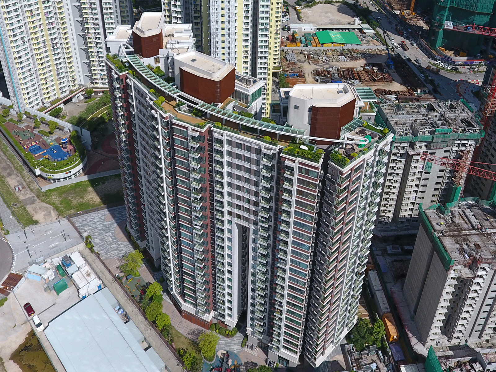 De Novo Roof Garden